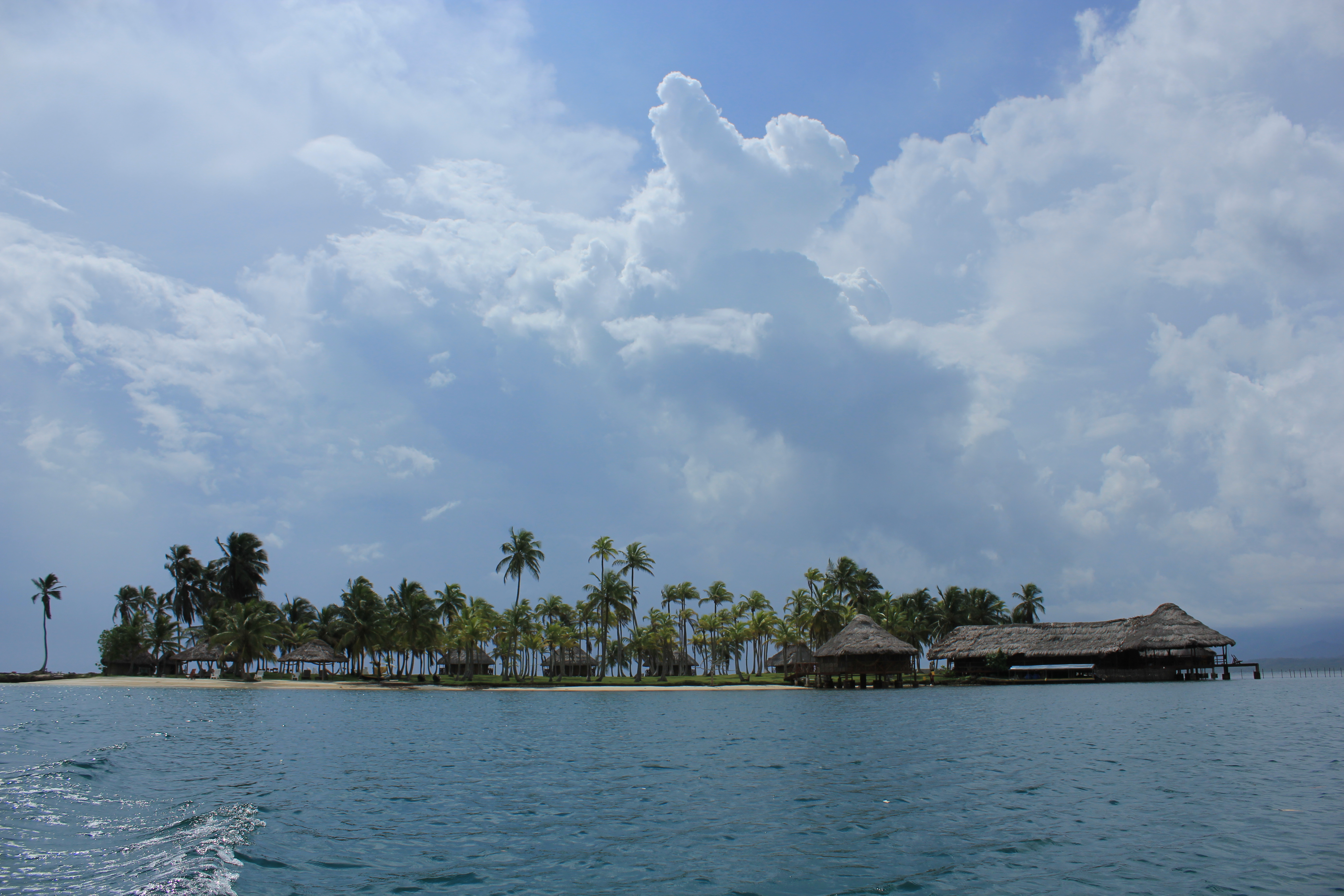 Isla en Guna Yala, Panamá